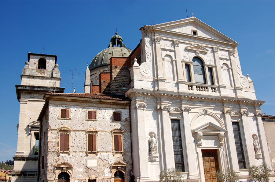 Chiesa di San Giorgio in Braida a Verona